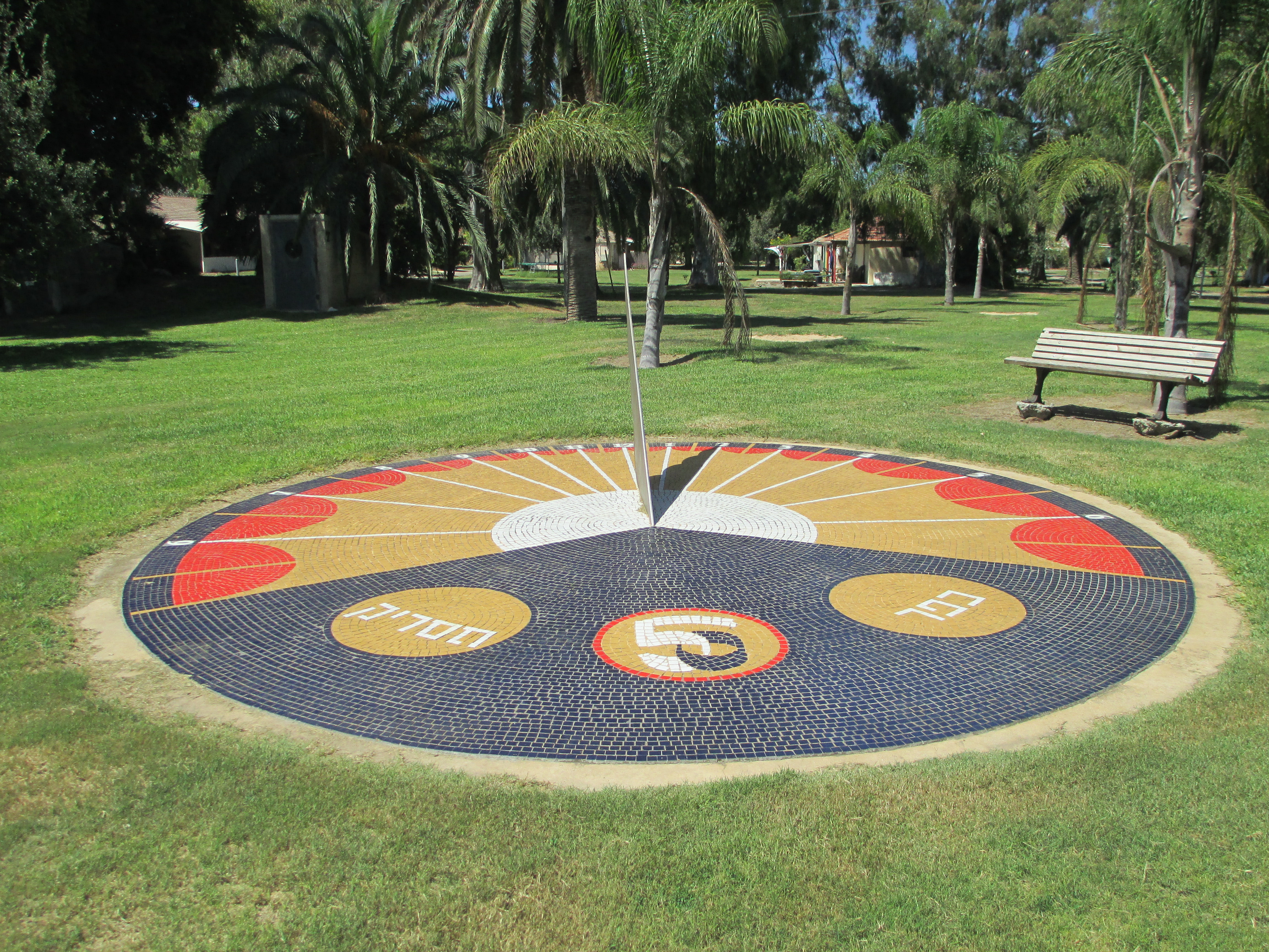 שעון שמש במרכז כפר מסריק